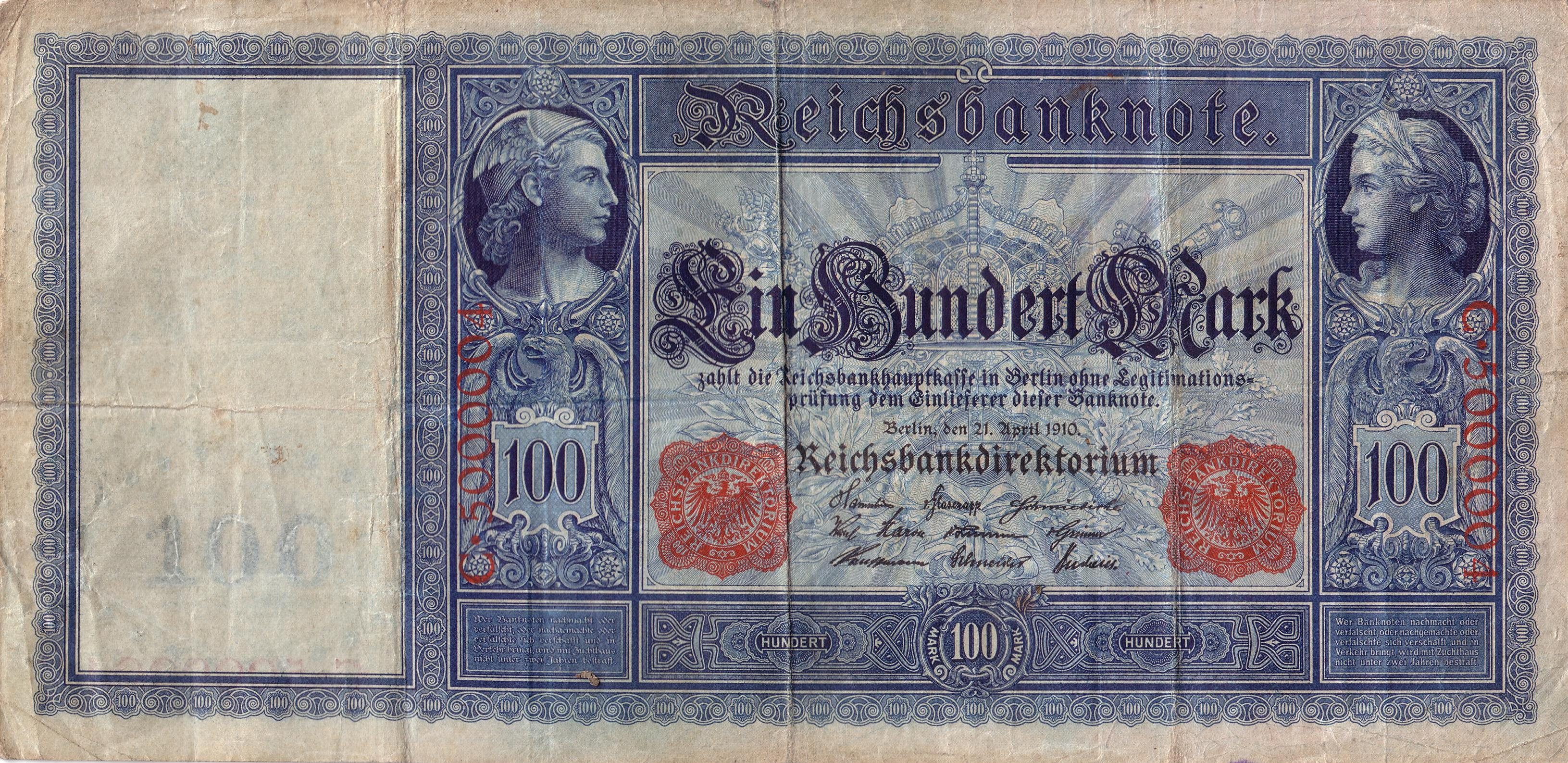 Ein Hundert Goldmark mit rotem Siegel